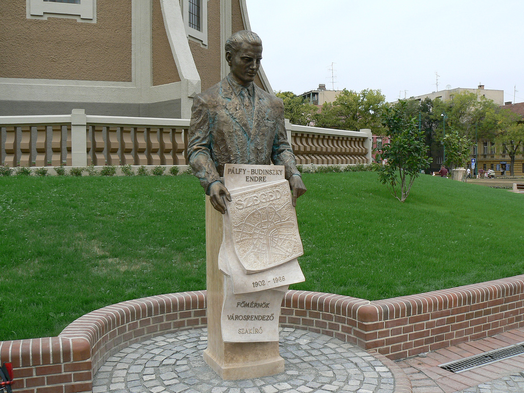 Pálfy-Budinszky Endre városi főépítész szobra (Bánvölgyi László, 2006). - Csongrád megye, Szeged, Szent István tér, a víztorony előtt.[1]